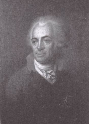 Karl II, Grand Duke of Mecklenburg-Strelitz